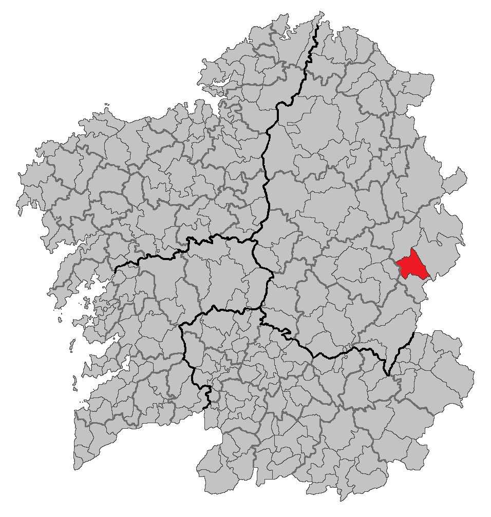 Mapa coa localización do concello de As Nogais.